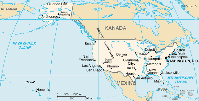 einfache Karte der USA